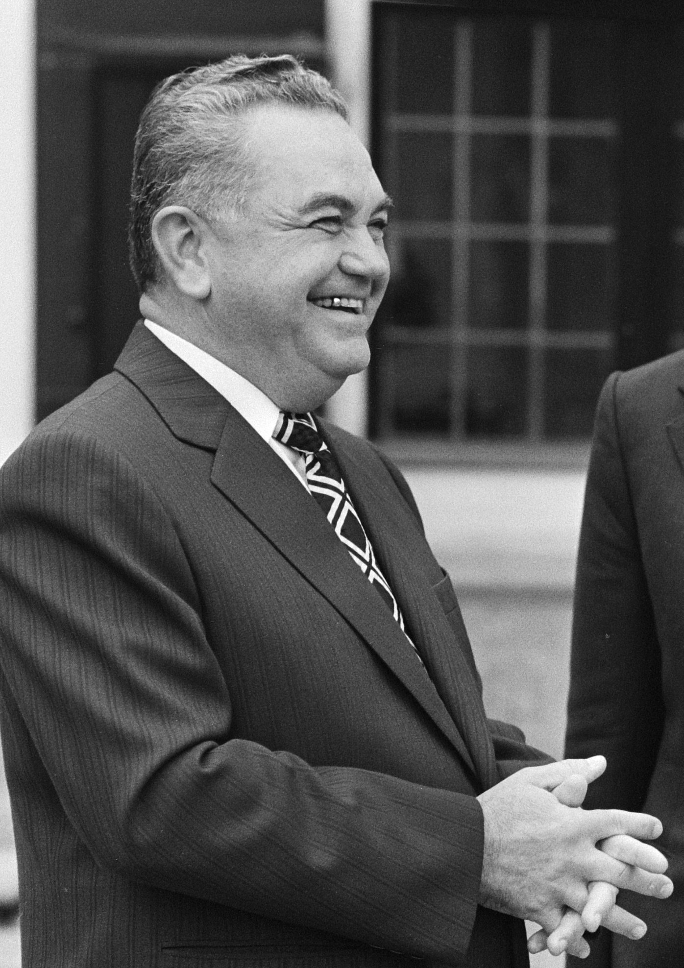 Premier Lubbers ontvangt premier Dascaslescu (l), in het midden een tolk